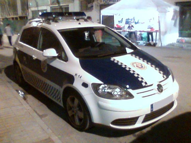 Coche de la Policia Local de Orihuela.